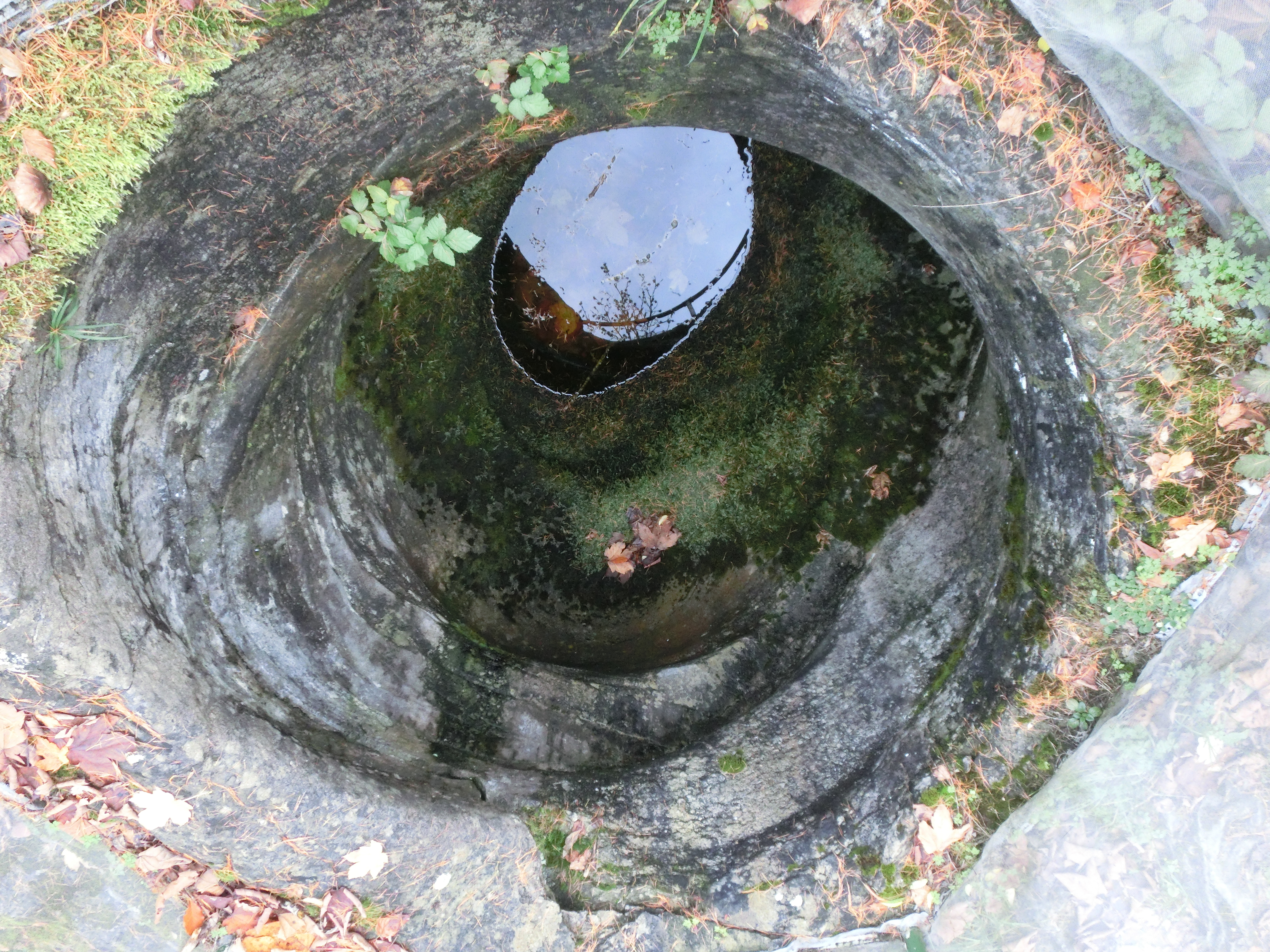 Deutschland - Bayern - Landkreis Lindau (Bodensee) - Scheidegg: Gletschertopf Scheffau